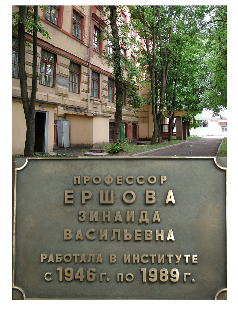 Надпись на здании, в котором работала Ершова (на фасаде технологического корпуса ВНИИНМ)